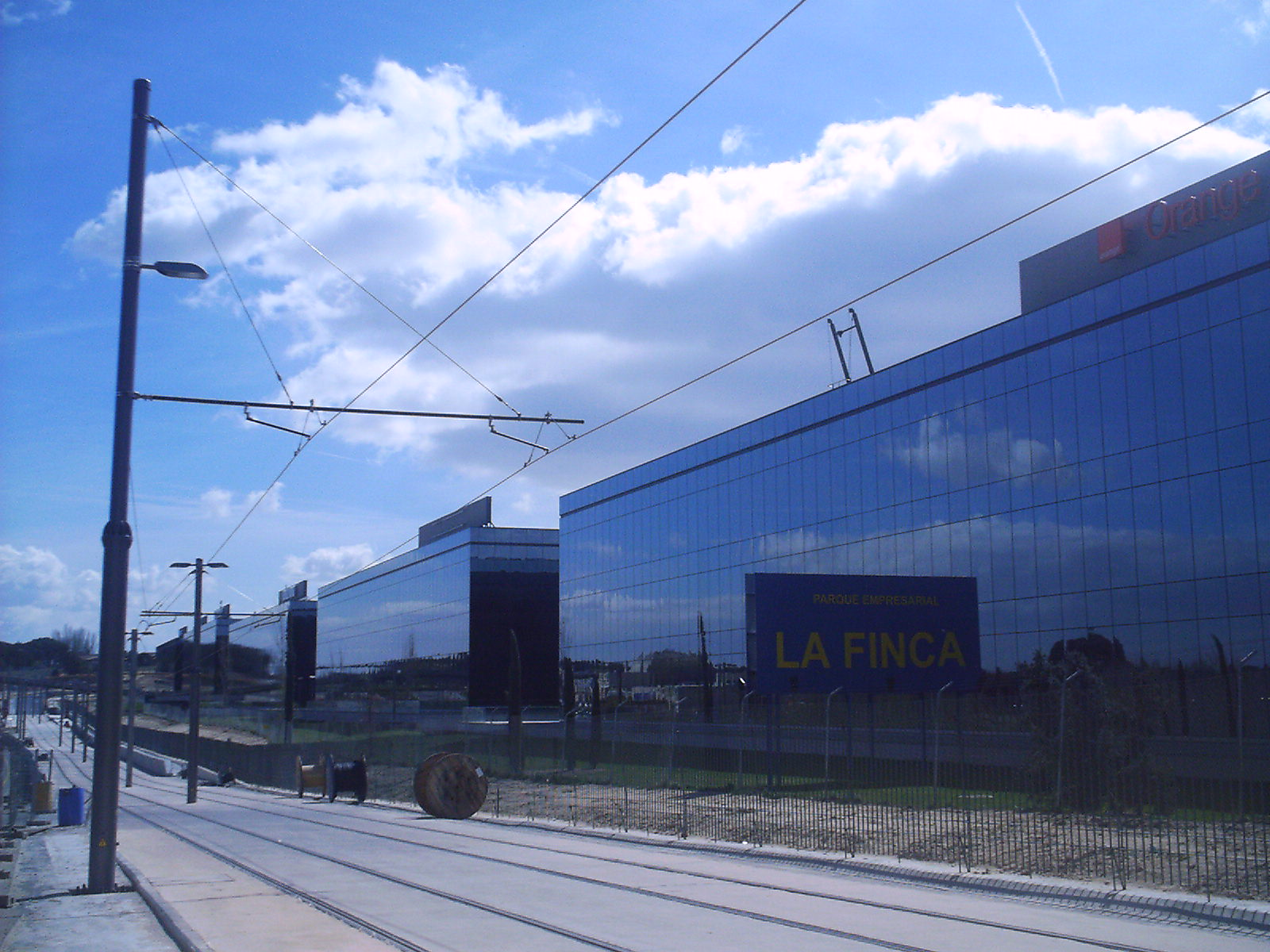 Tranviaria para el metro ligero en Pozuelo de Alarcón. Madrid. España